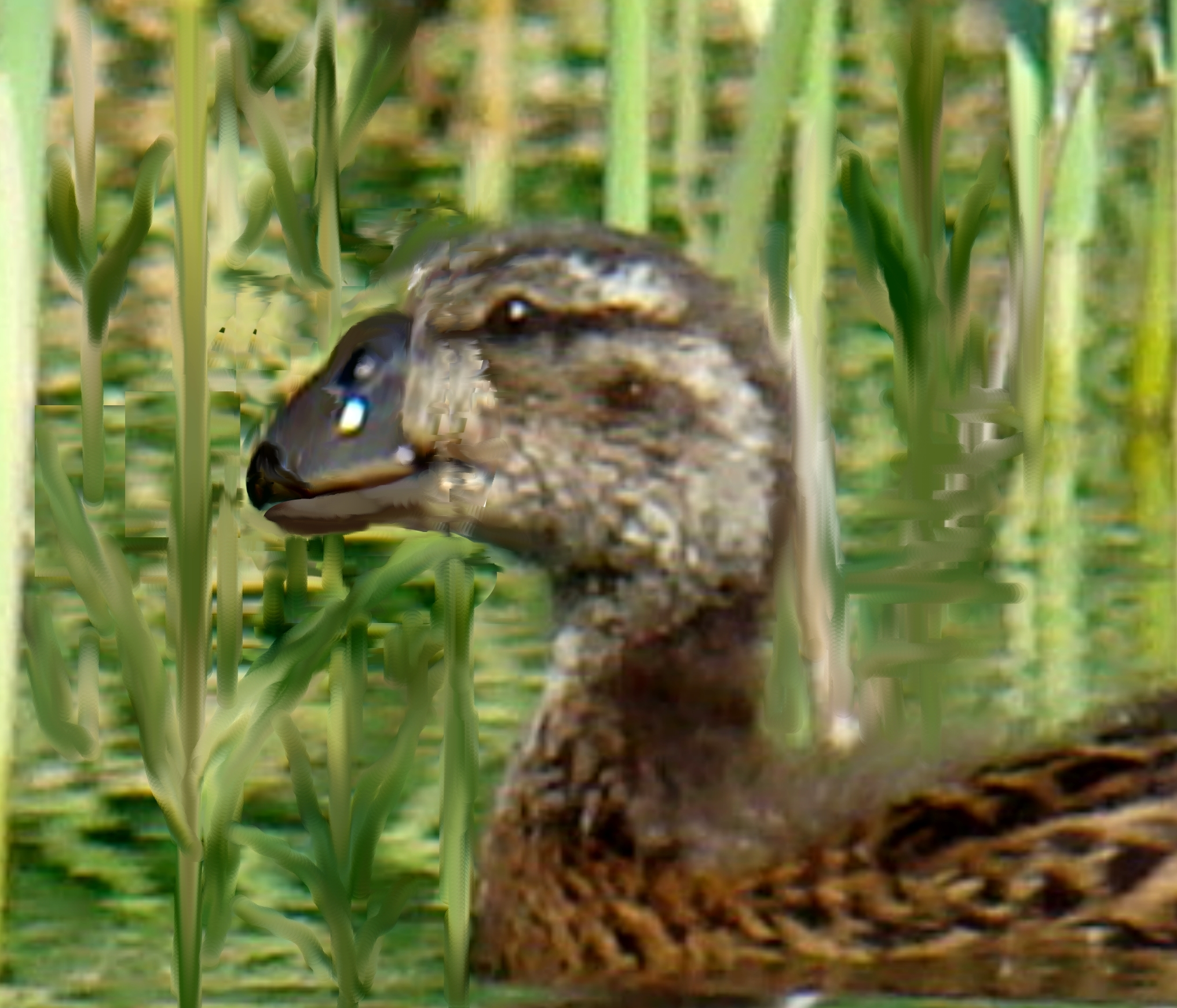 Chelychelynechen quassus may have looked like this, Sorce for informations about the species Chelychelynechen quassus - die ausgestorbene flugunfähige Ente hatte laut den Knochenfunden die Schnabelform, die ich hier erzeugt habe, indem ich das Bild verzerrt habe, (Quelle für Schnabelform). Die nächsten lebenden Verwandten sind die Anantini und als flugunfähiger Vogel ist damit zu rechnen, daß ihr Federkleid eher an das Jugendkleid anderer Enten erinnert hat als an das erwachsener Enten.